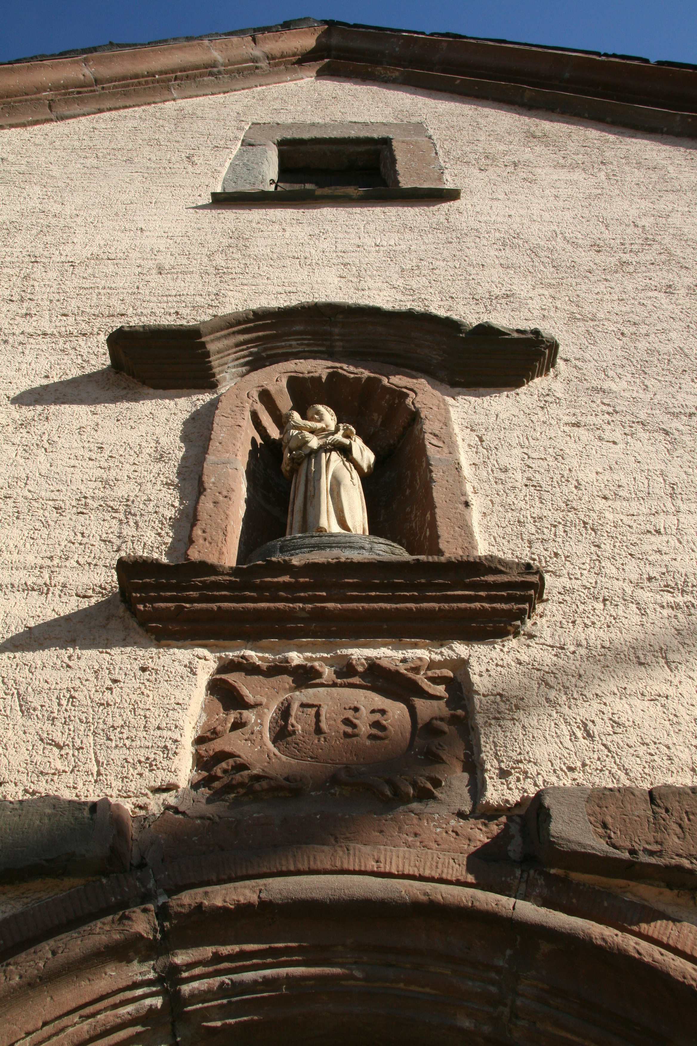 Mertzig Kapelle erbaut 1733 im hiesigem Stein